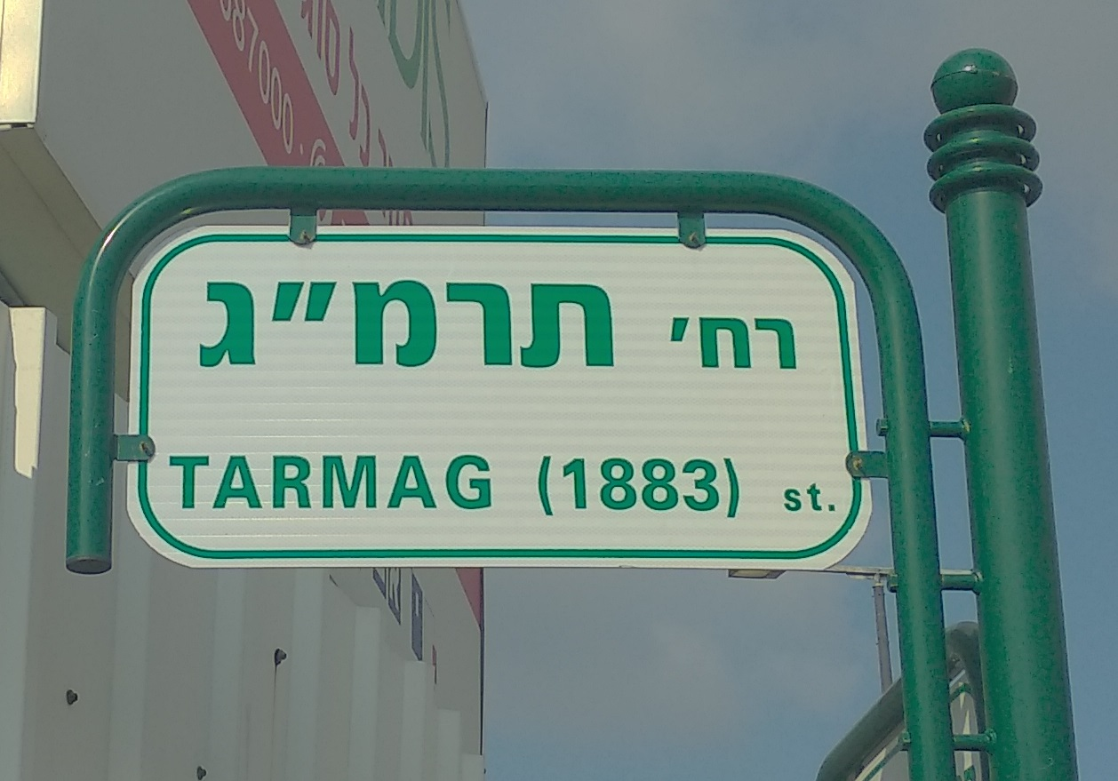 רחוב תרמ"ג בנס ציונה קרוי על שם שנת ייסודה של העיר